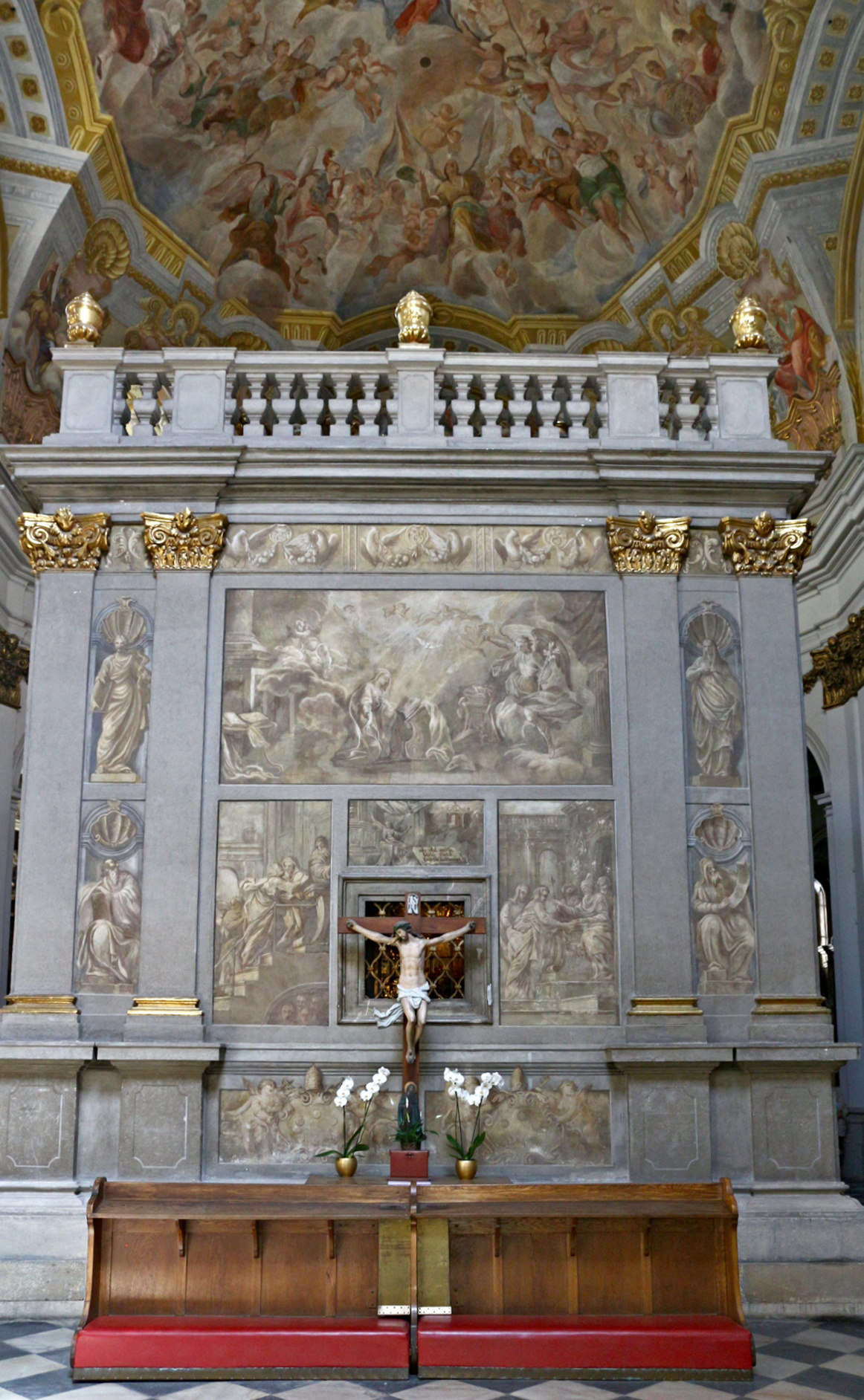 Brno Loretánská kaple